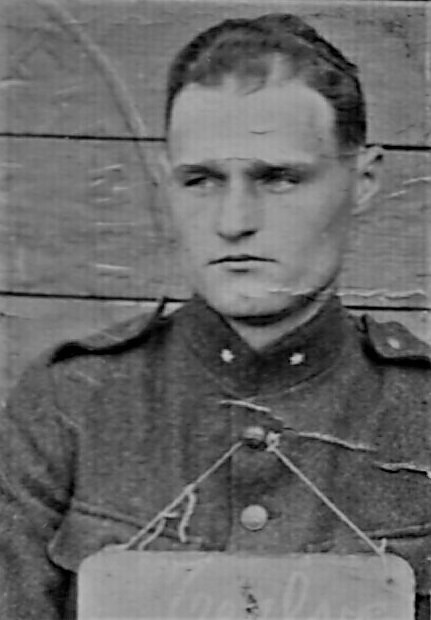 Dernier soldat belge à avoir été tué lors de la WWI le 11 novembre 1918 à 10h45.